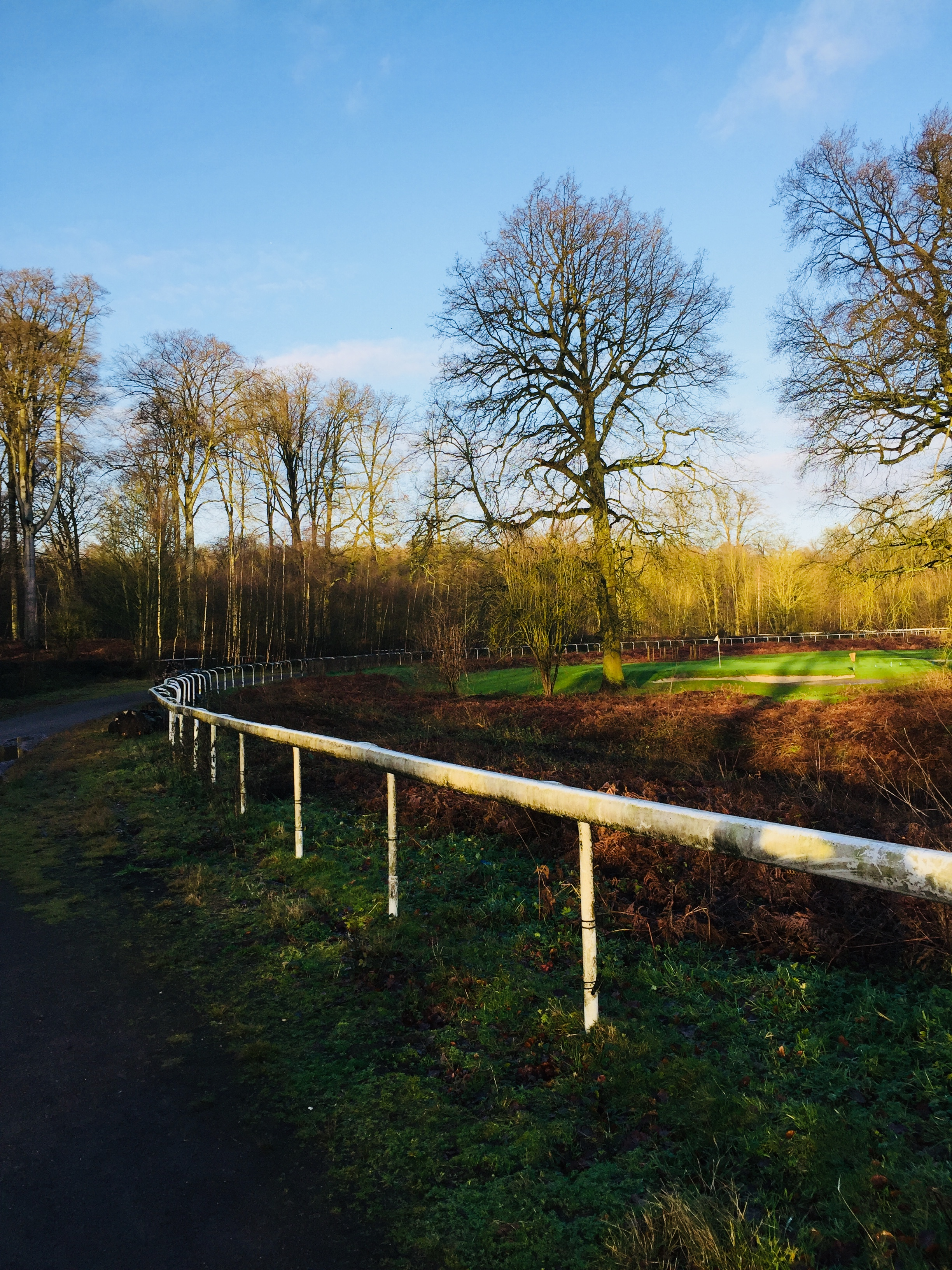 The Old Hippodrome of Brussels